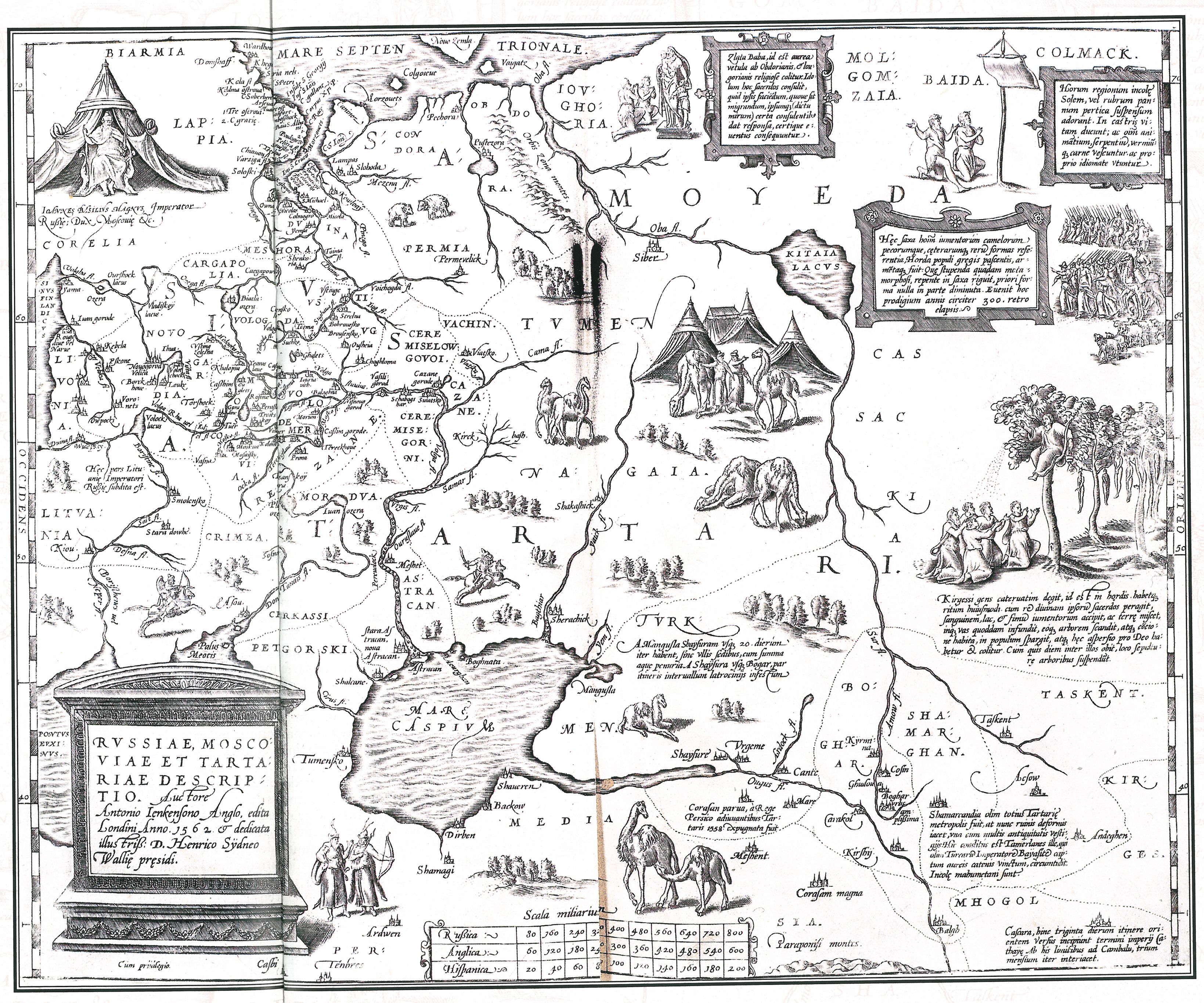 Россия Московия Тартария. Англо-голландская карта ru:1562 года (Лондон) с исправлениями 1598 года (Антверпен).